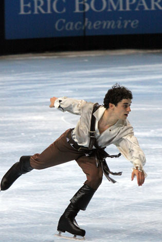 2009 Trophée Éric Bompard - Javier Fernández